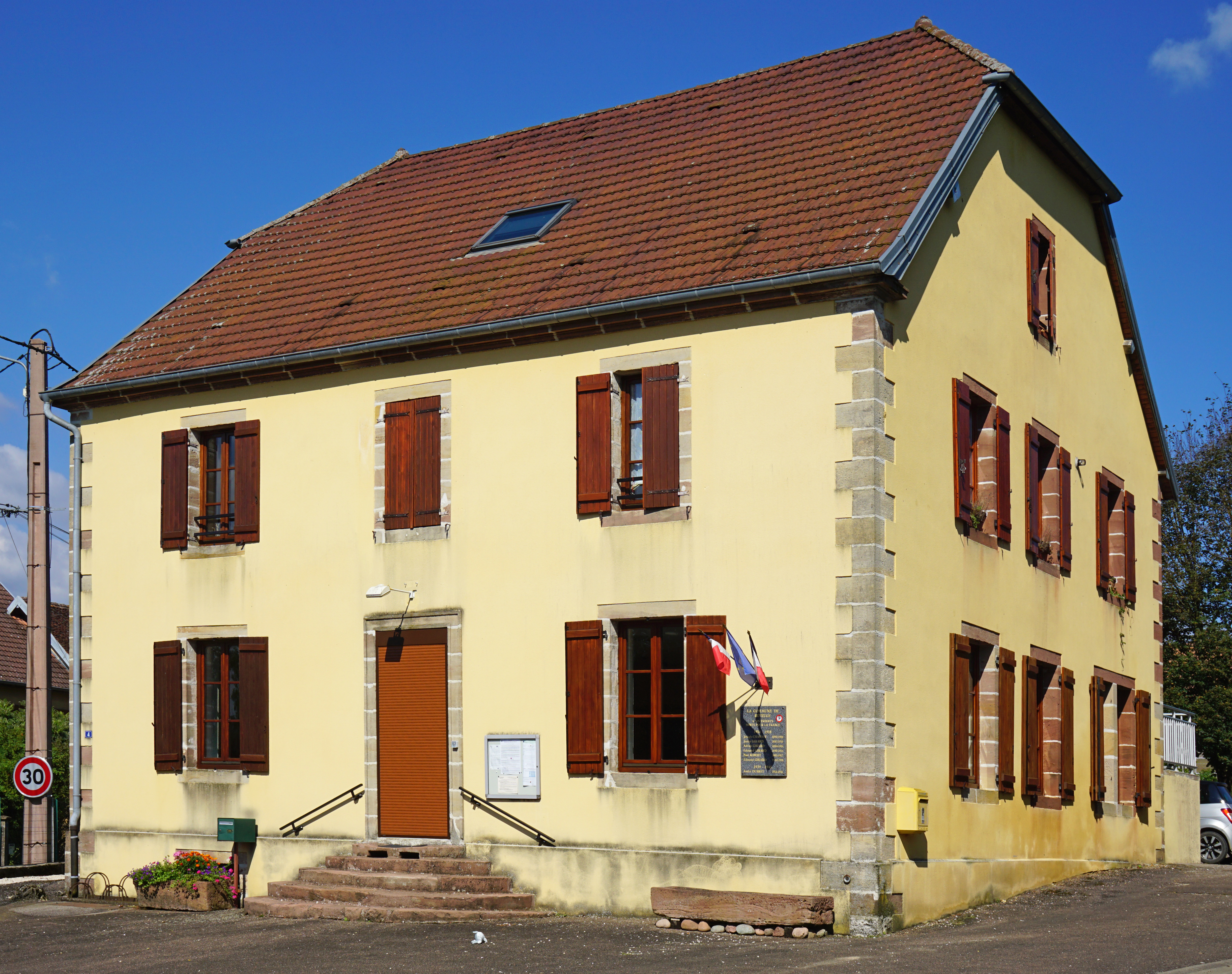 Mairie de Beveuge.